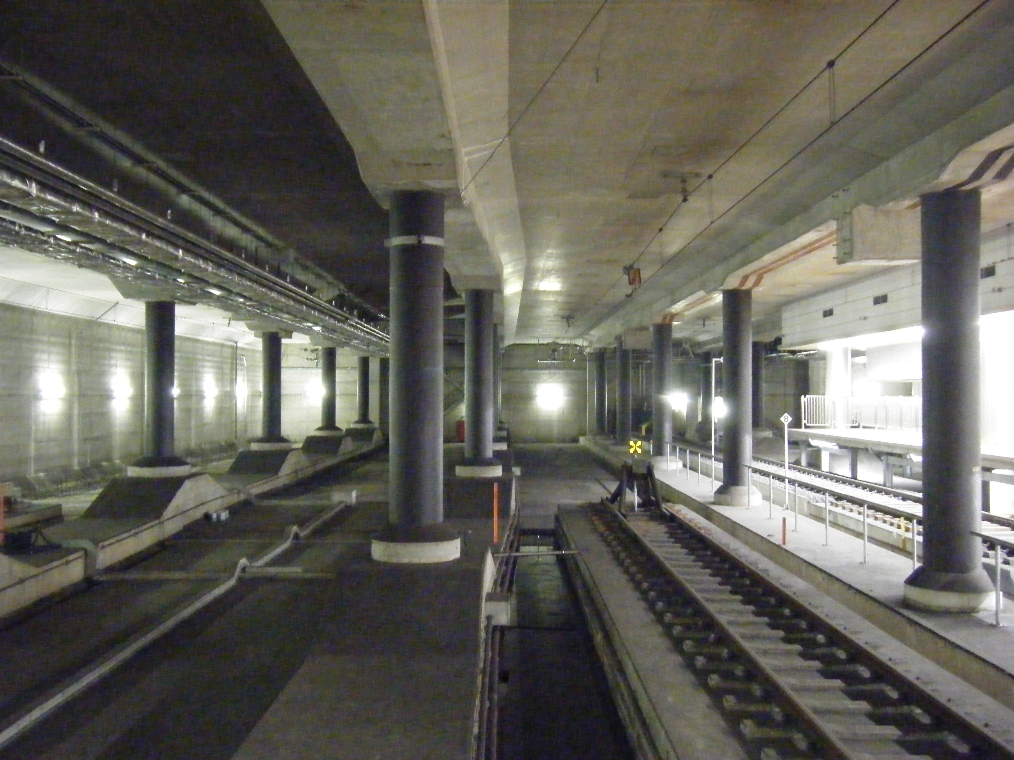 成田空港駅の突き当たり